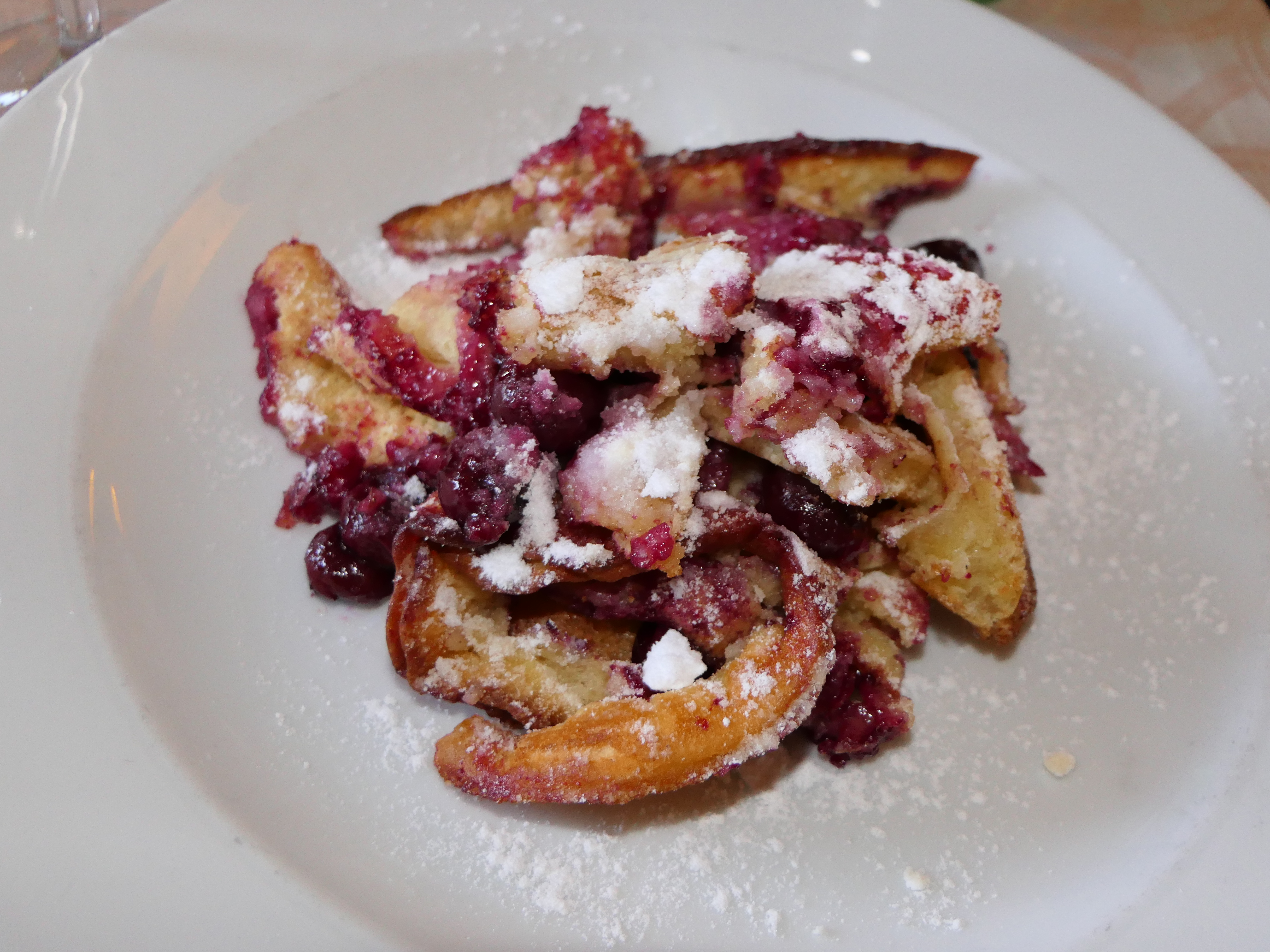 Kaiserschmarrn mit Sauerkirschen (Hotel & restaurant Větruše, Ústí nad Labem)